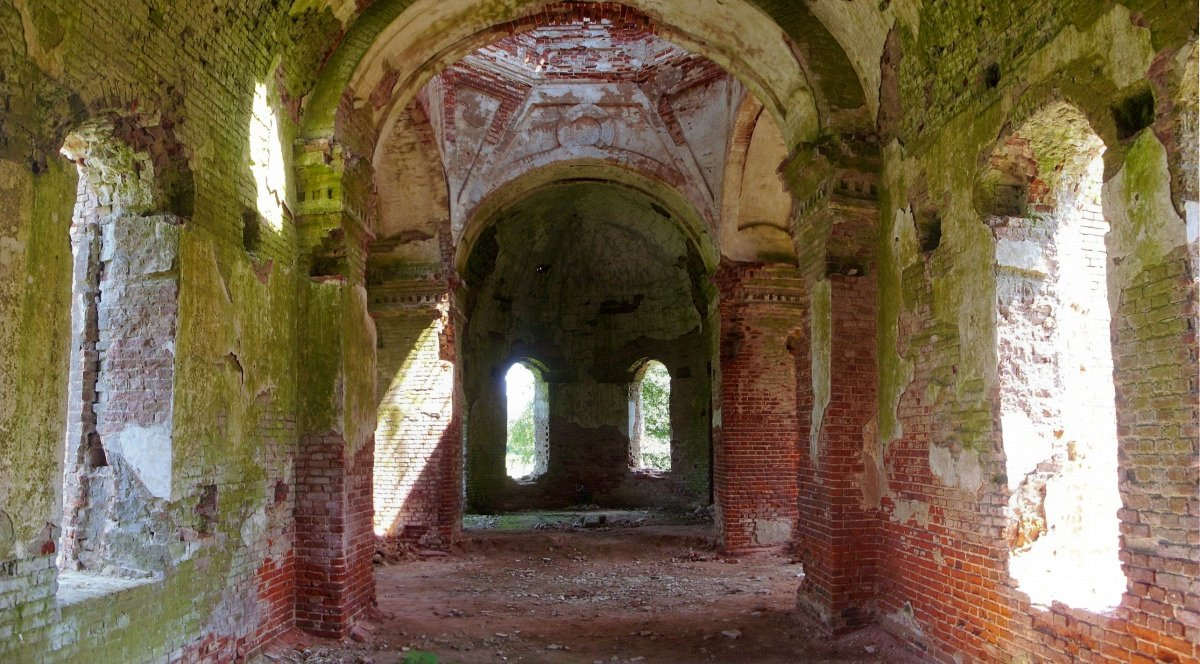 Межава. Свята-Васкрасенская царква